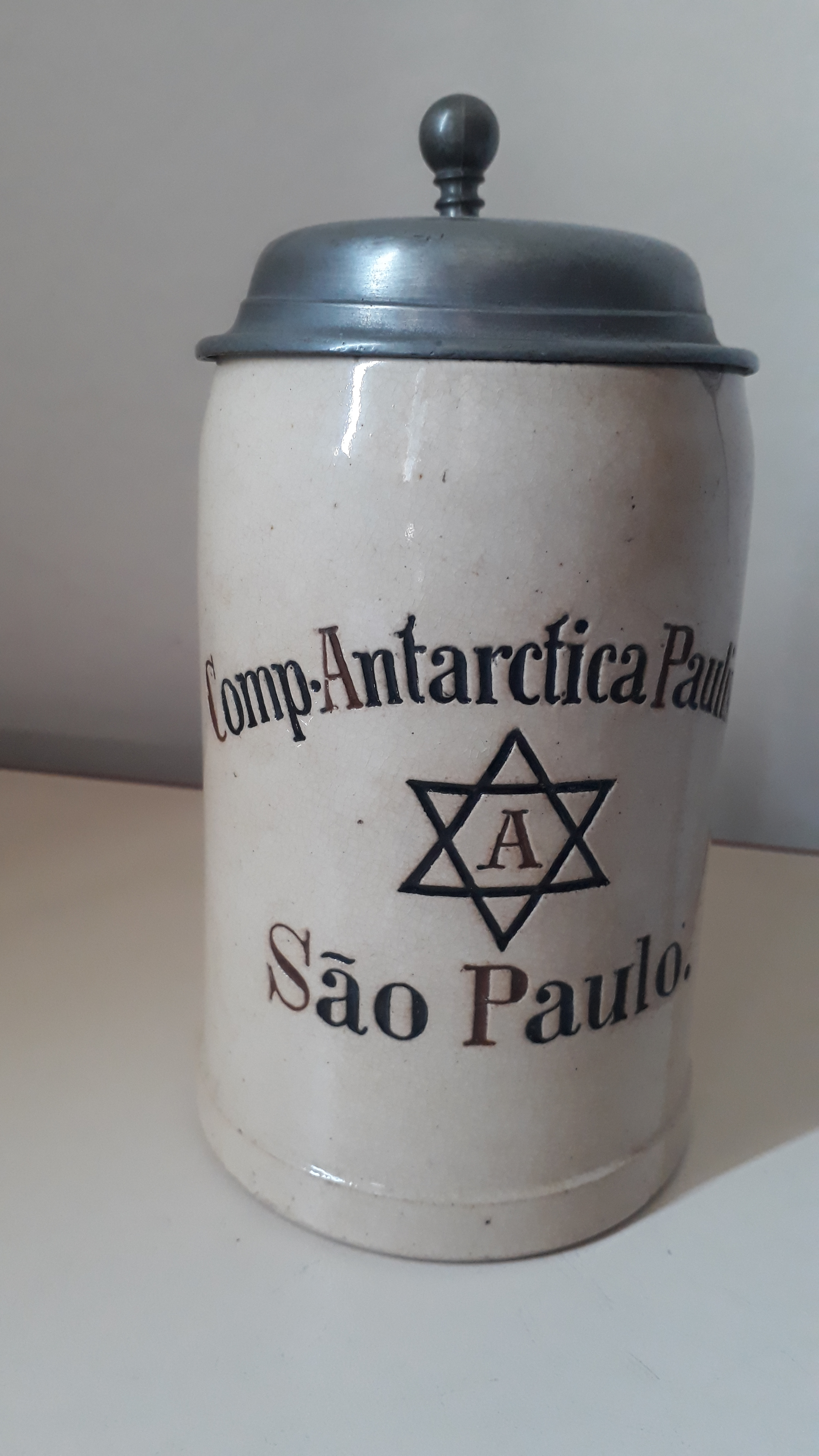 Caneca comemorativa presenteada para os distribuidores do produto entre 1889 à 1905 em São Paulo-Brasil